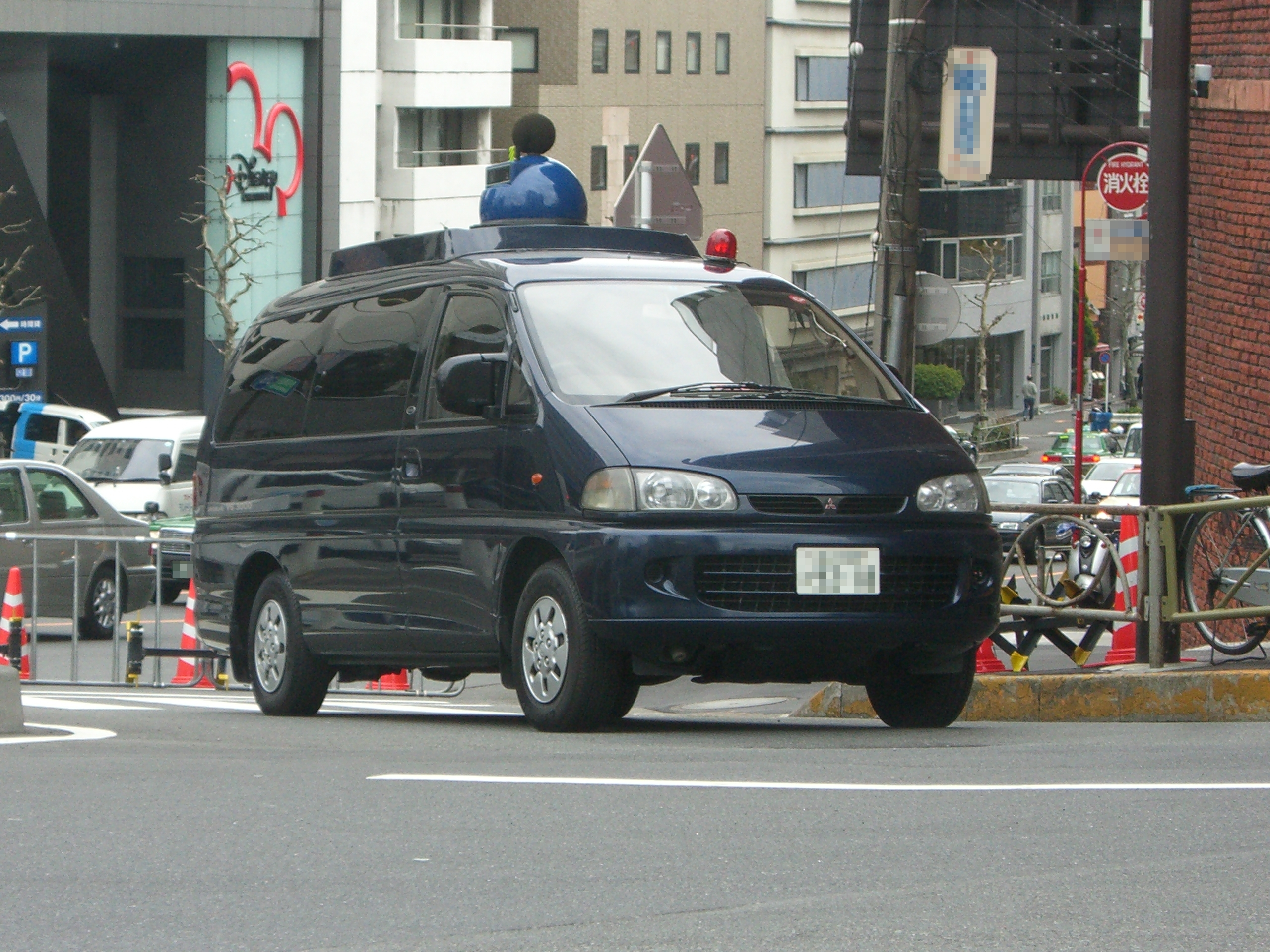 騒音測定車（都内桜田通り土器坂付近にて） Mitsubishi Delica L400 Space Gear - Series 1 (Exceed model) Police camera car